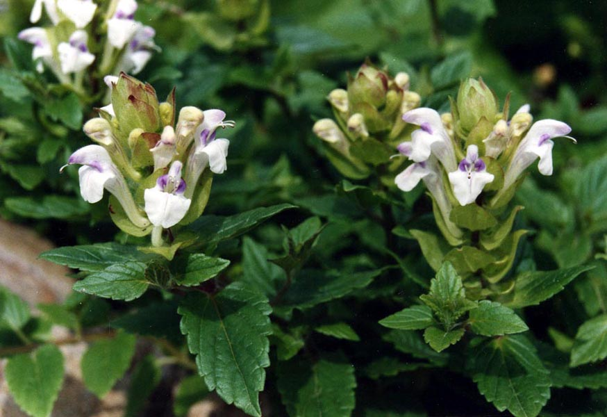 Scutellaria alpina 'Alba'